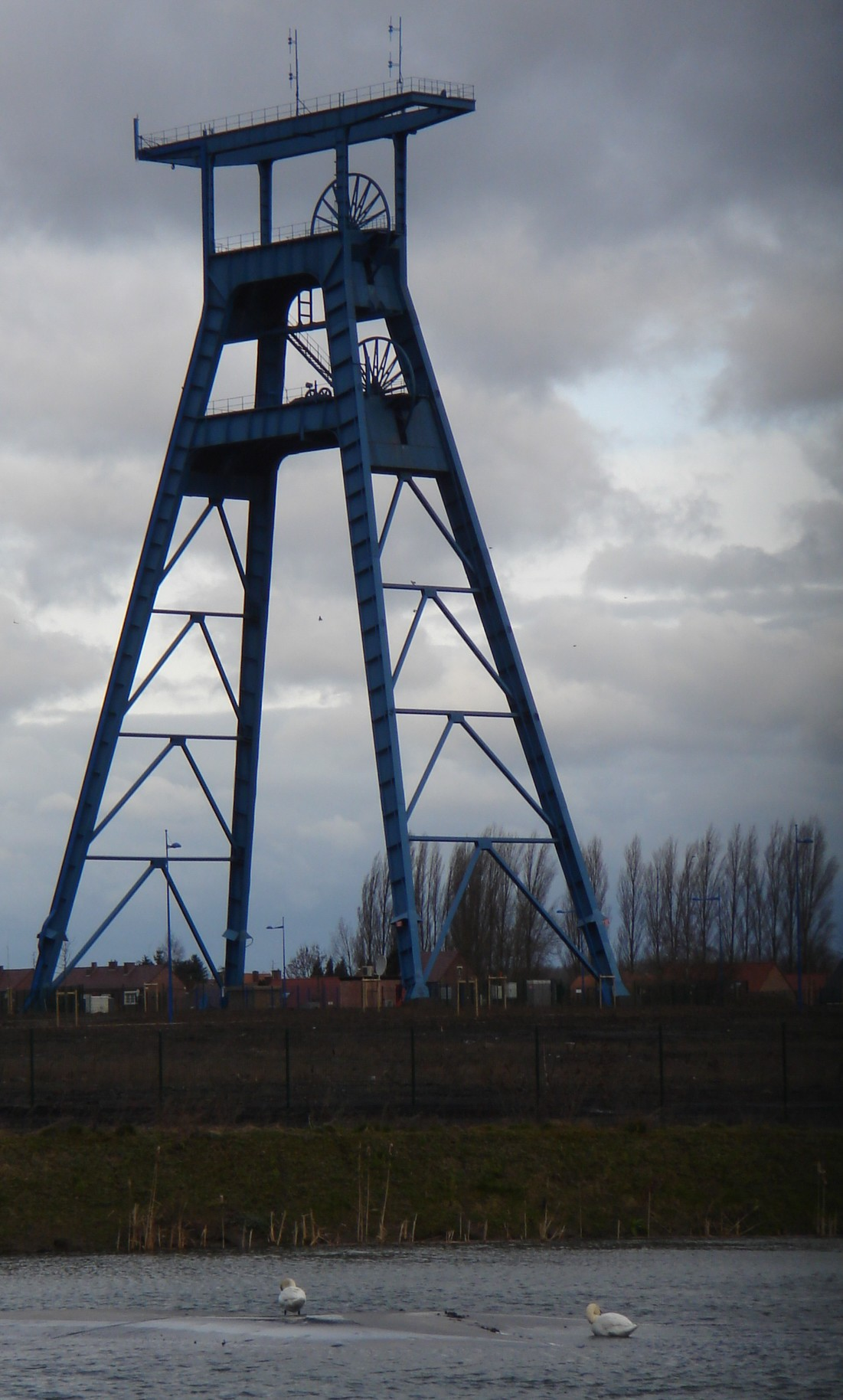 La Fosse n° 9 de la Compagnie des mines de l'Escarpelle était un charbonnage constitué d'un seul puits situé à Roost-Warendin, Nord, Nord-Pas-de-Calais, France.